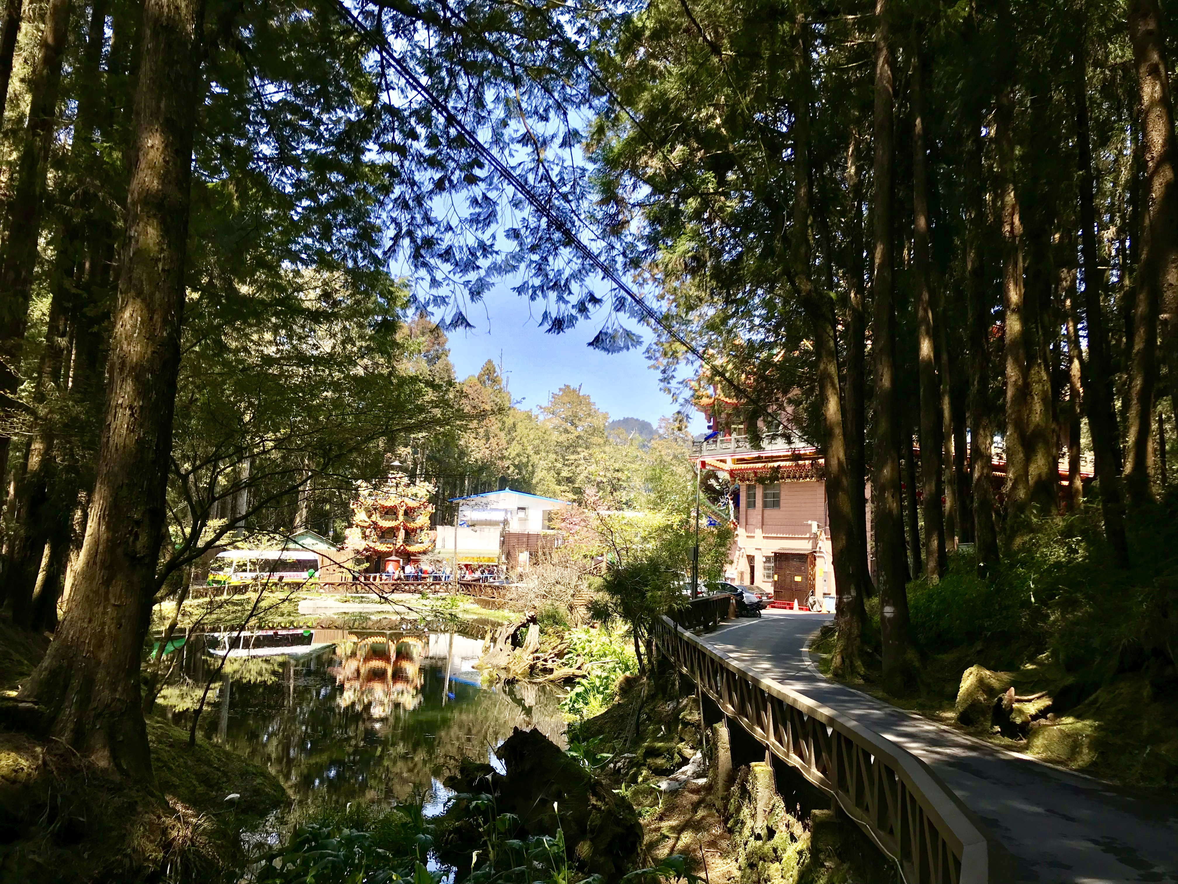 阿里山受鎮宮與池水